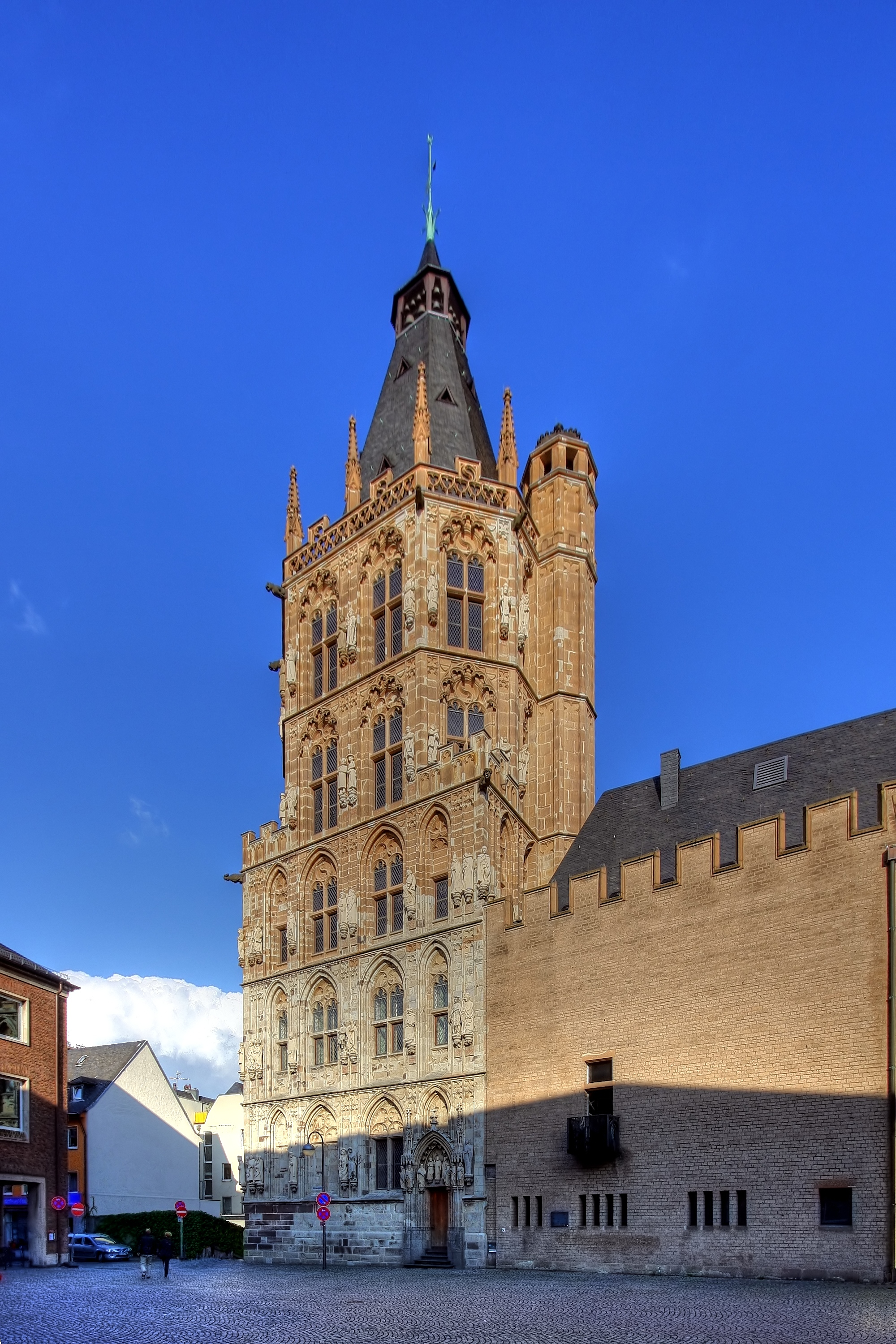 Rathausturm Köln. Ansicht von Westen.